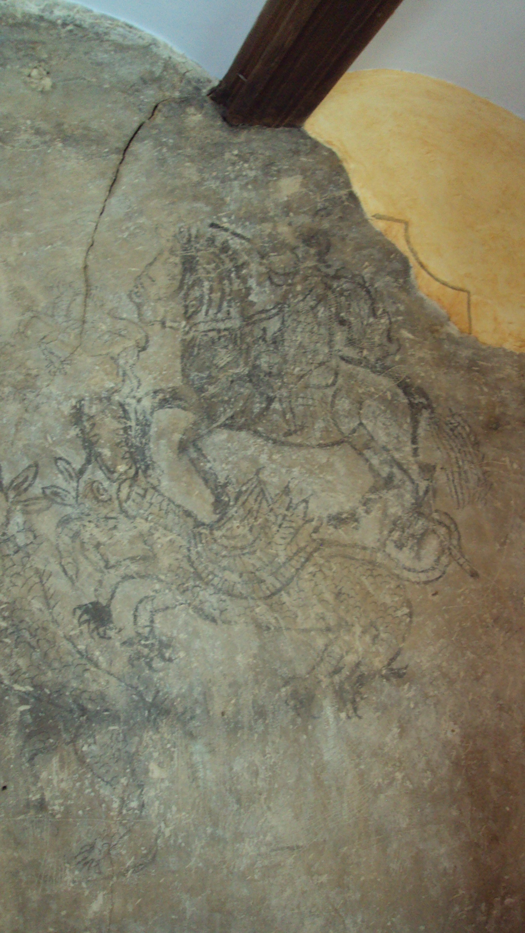 Pintura de San Jorge en la sala principal de Casa Mur